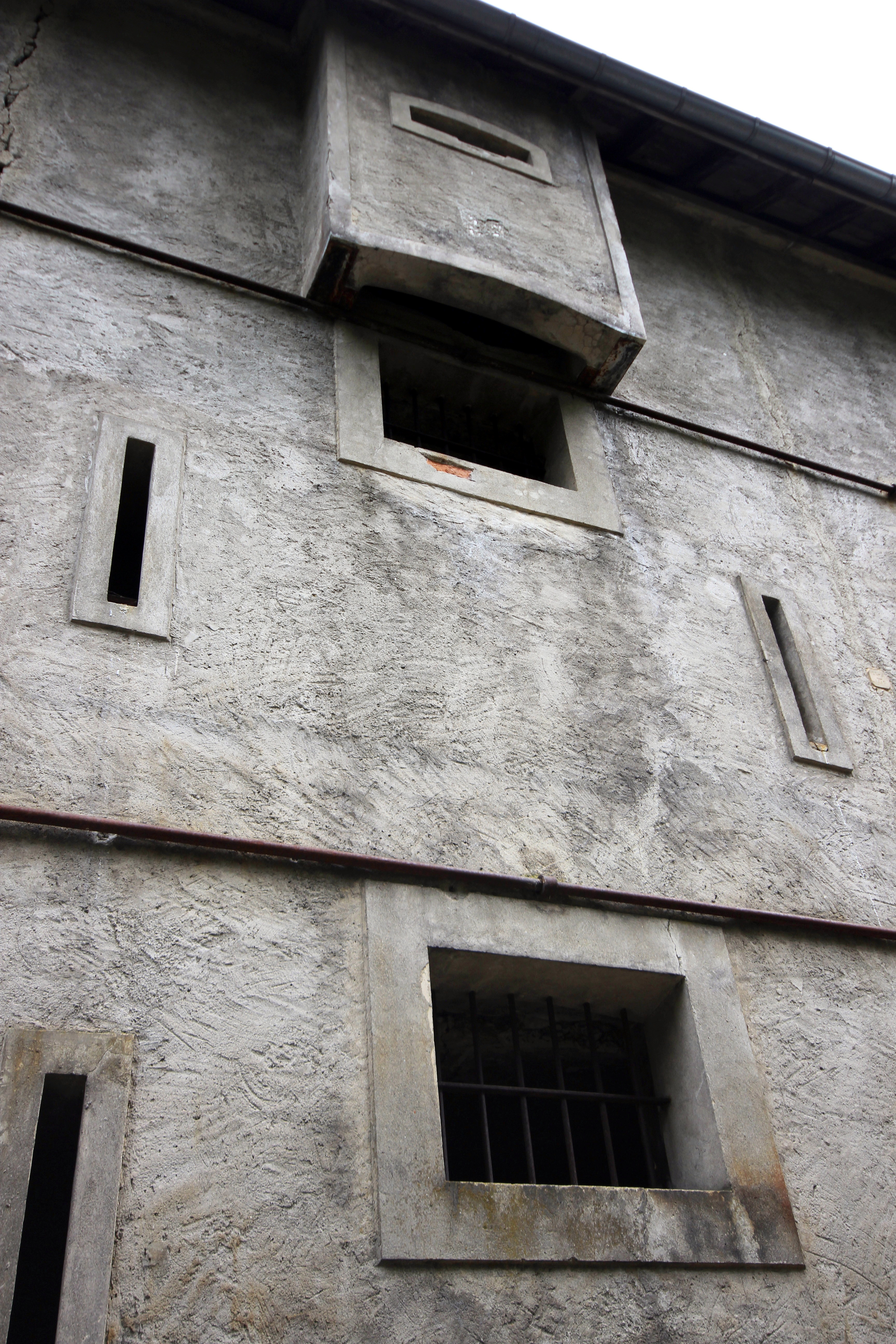 Détail de la façade du blockhaus de l’Aitelet